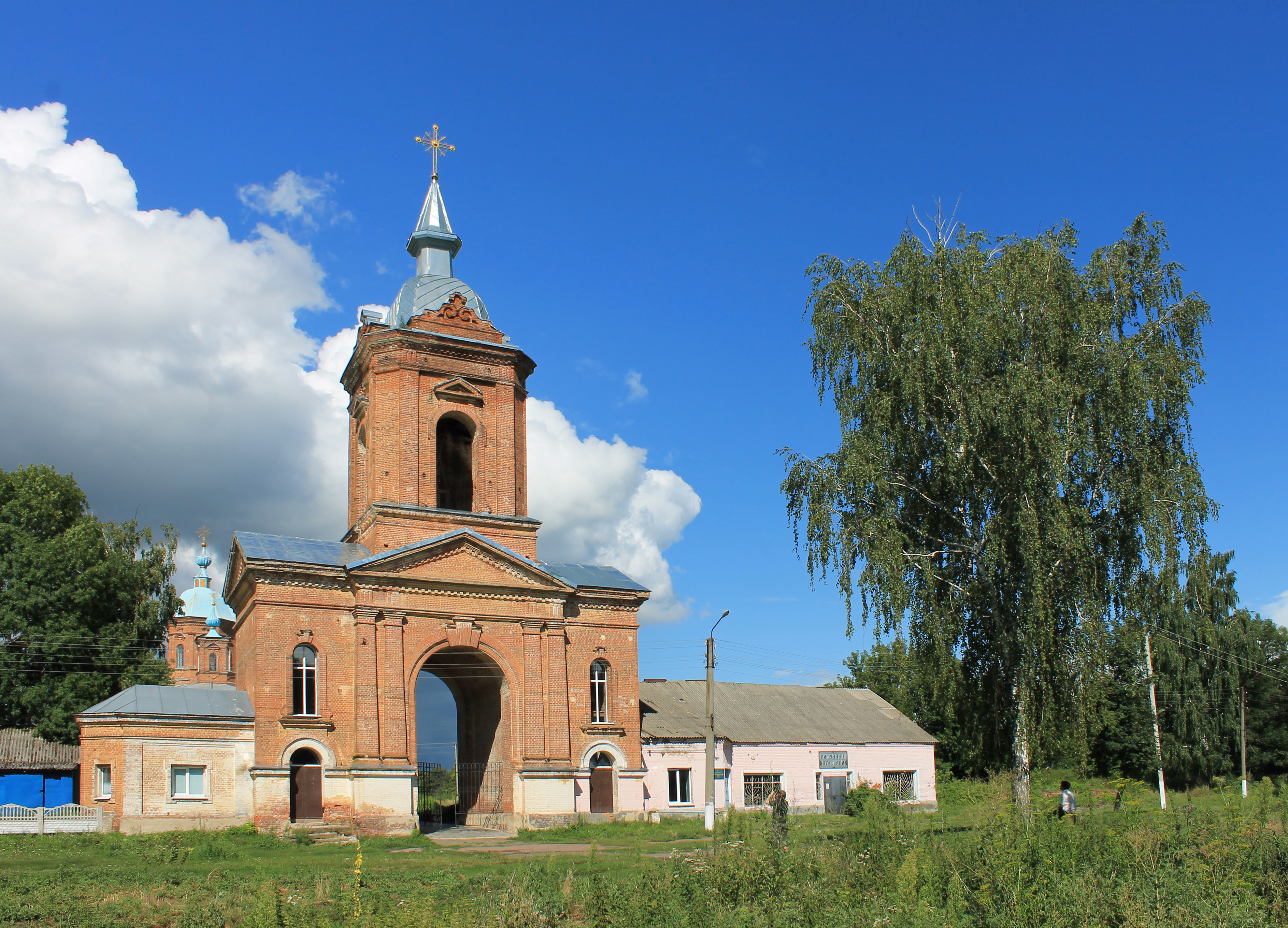 Ансамбль Спасо-Преображенської церкви із дзвіницею 1896р., с.Ворожба, Лебединський р-н., Сумська обл.